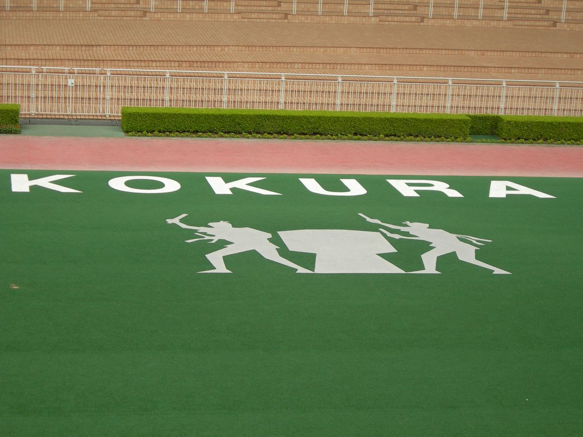 小倉競馬場パドックに描かれた小倉祇園太鼓のマーク